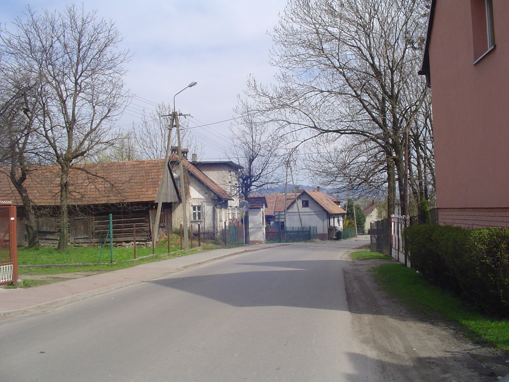 Ulica Główna w Radziechowach. Z lewej strony ulicy kapliczka przydrożna nazywana "u Buka".